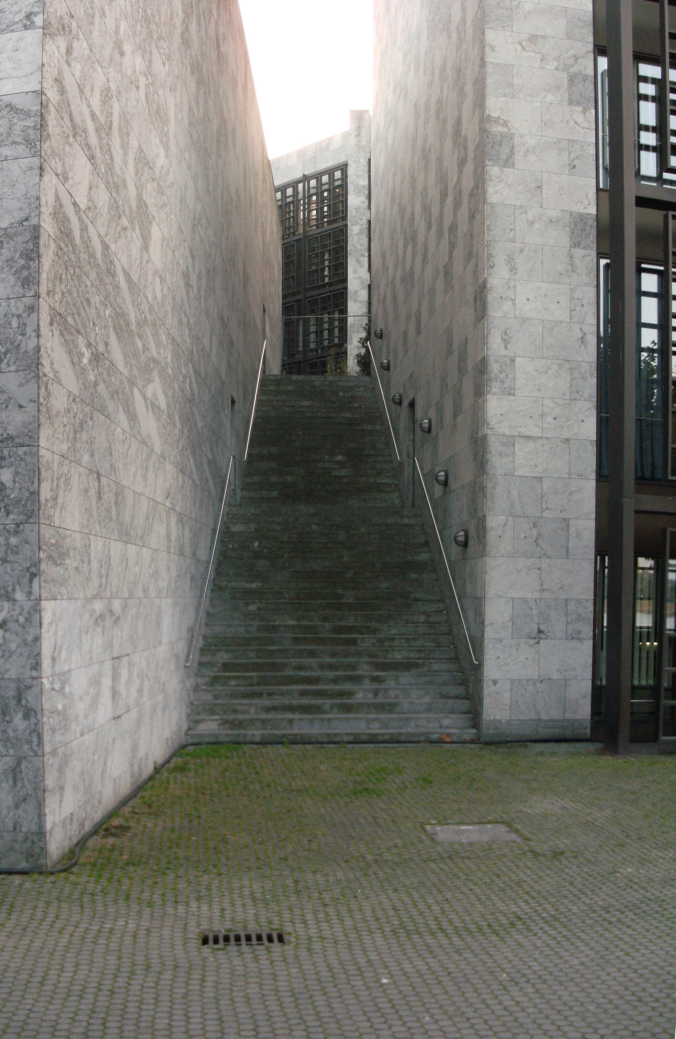 Geschlossene Treppe zum Adenauerufer des Mainzer Rathaus